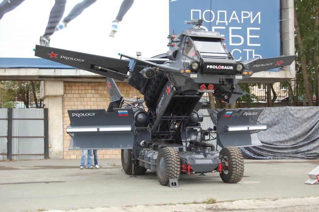 мобильный звуковой комплекс Пролозавр, Фото загружено для использования в статье Фарих,_Михаил_Ростиславович, разрешение через OTRS